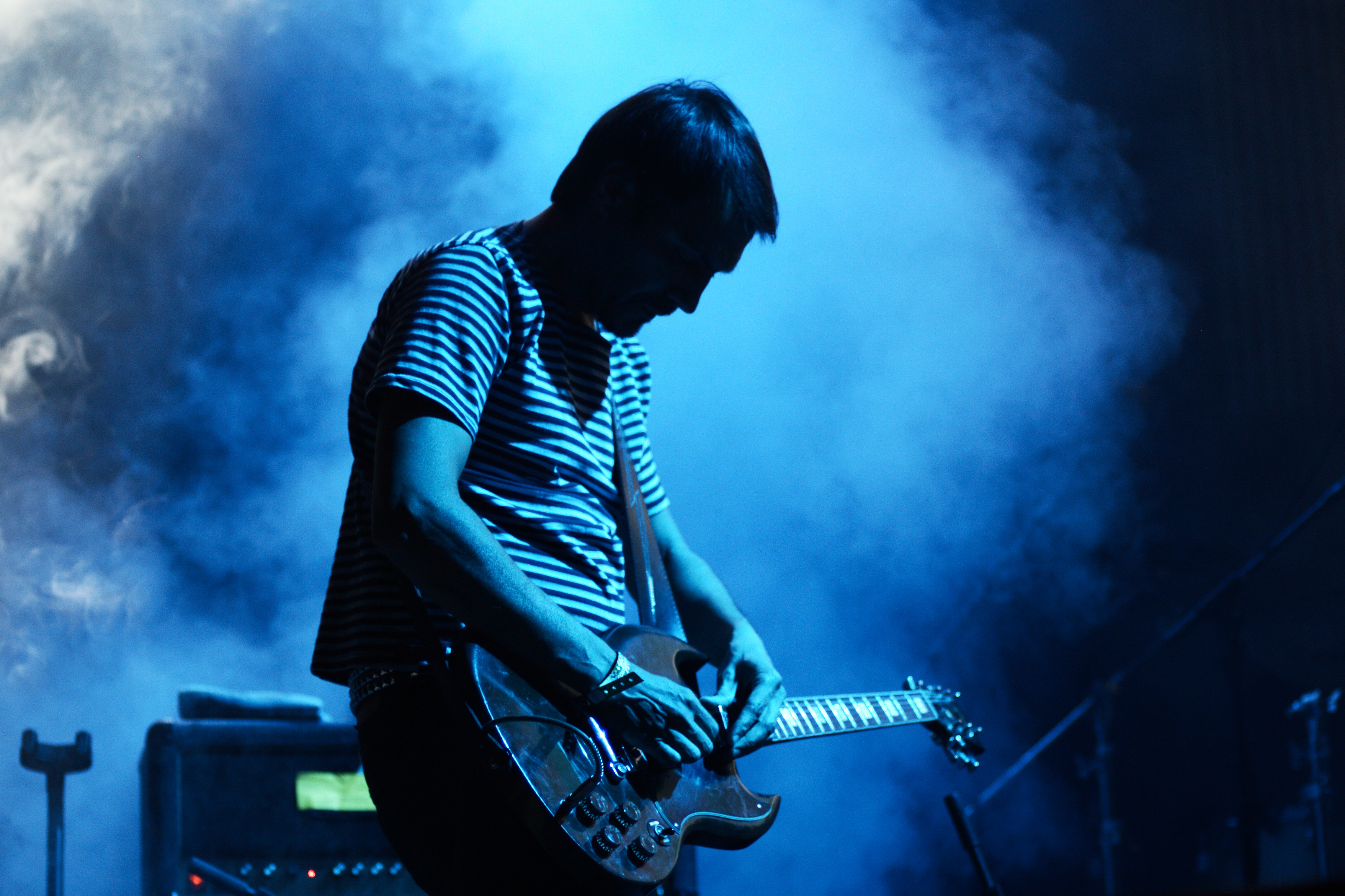 Floren (Los Planetas) en el Contempopranea 2010. Alburquerque (Badajoz) 24/07/2010